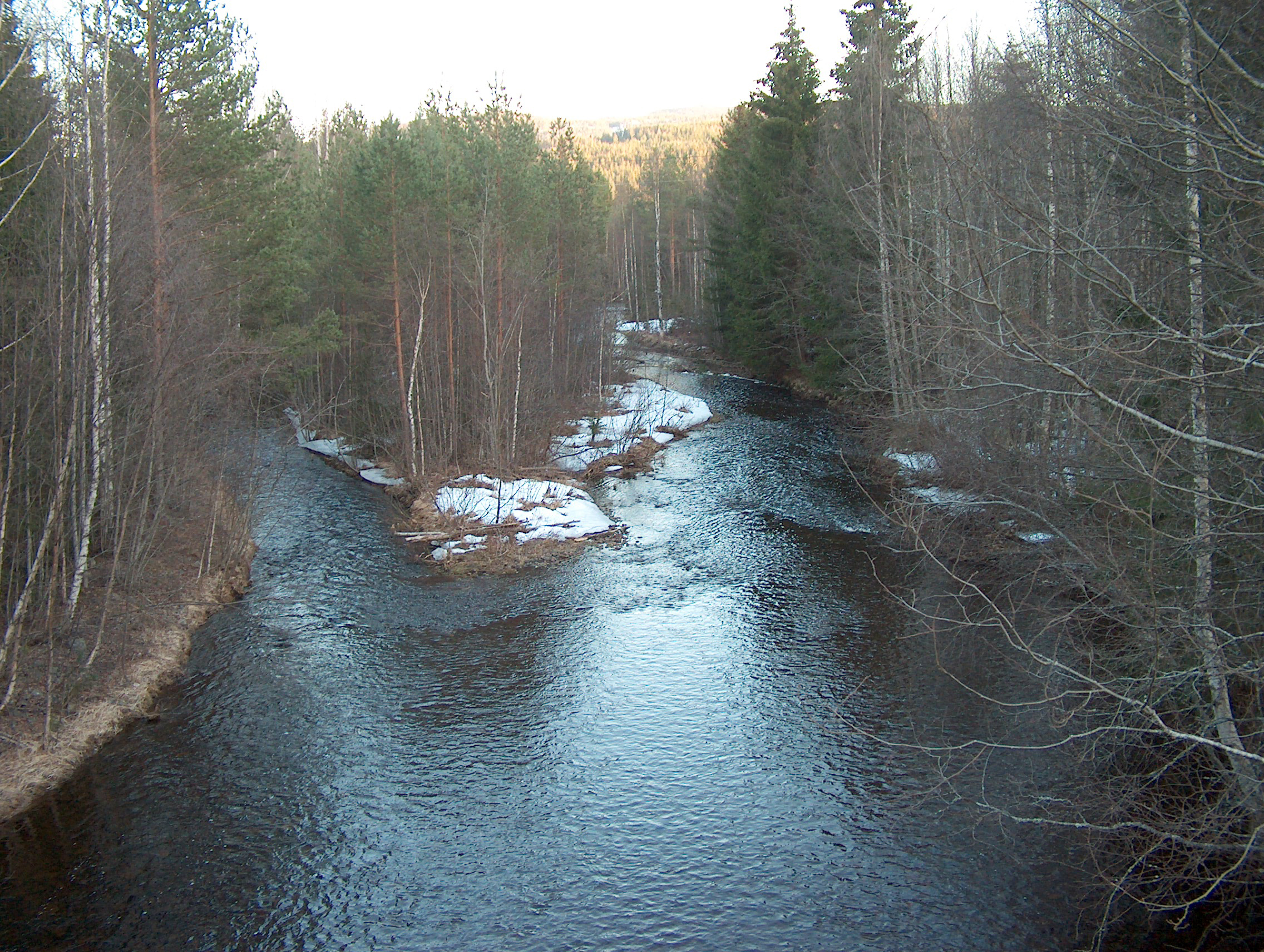 Rudselva ved Ålde bru, Rudsvassdraget